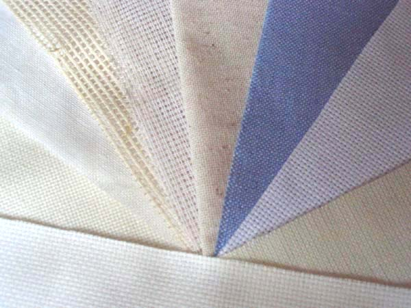 Borduurstoffen